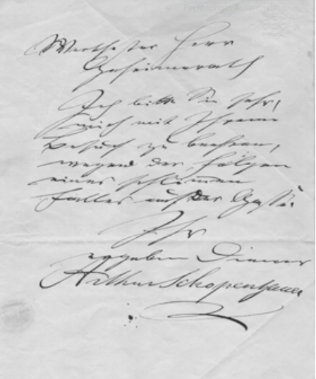 Brief Arthur Schopenhauers an seinen Hausarzt Salomon Friedrich Stiebel